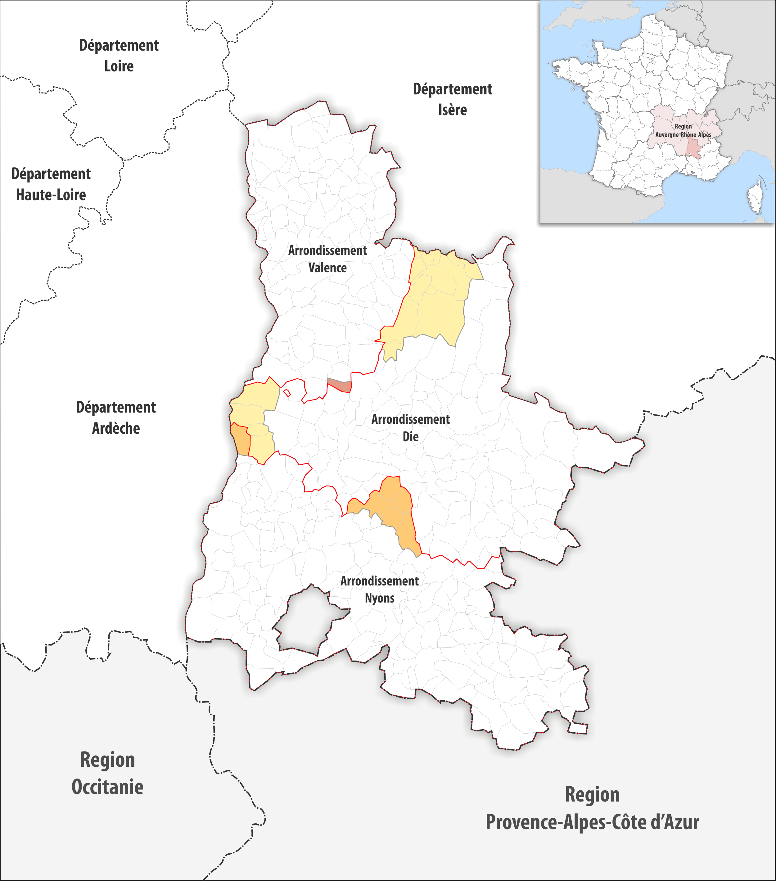 Arrondissements Anpassungen auf 2017 im Departement Drôme